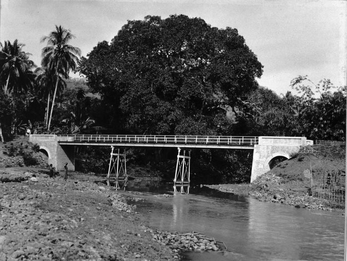 Foto. De brug over de Trengoelon rivier nabij Kaliradjoet.